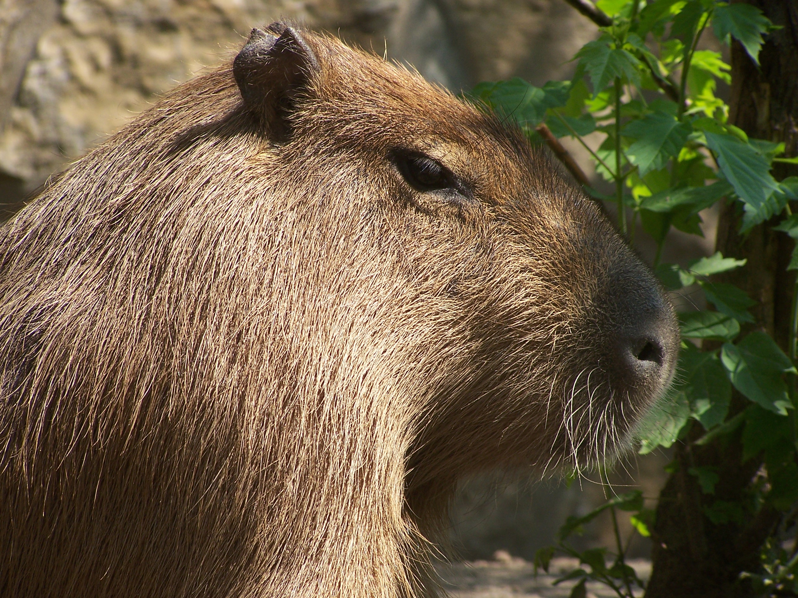 Vizidisznó (Hydrochoerus hydrochaeris)